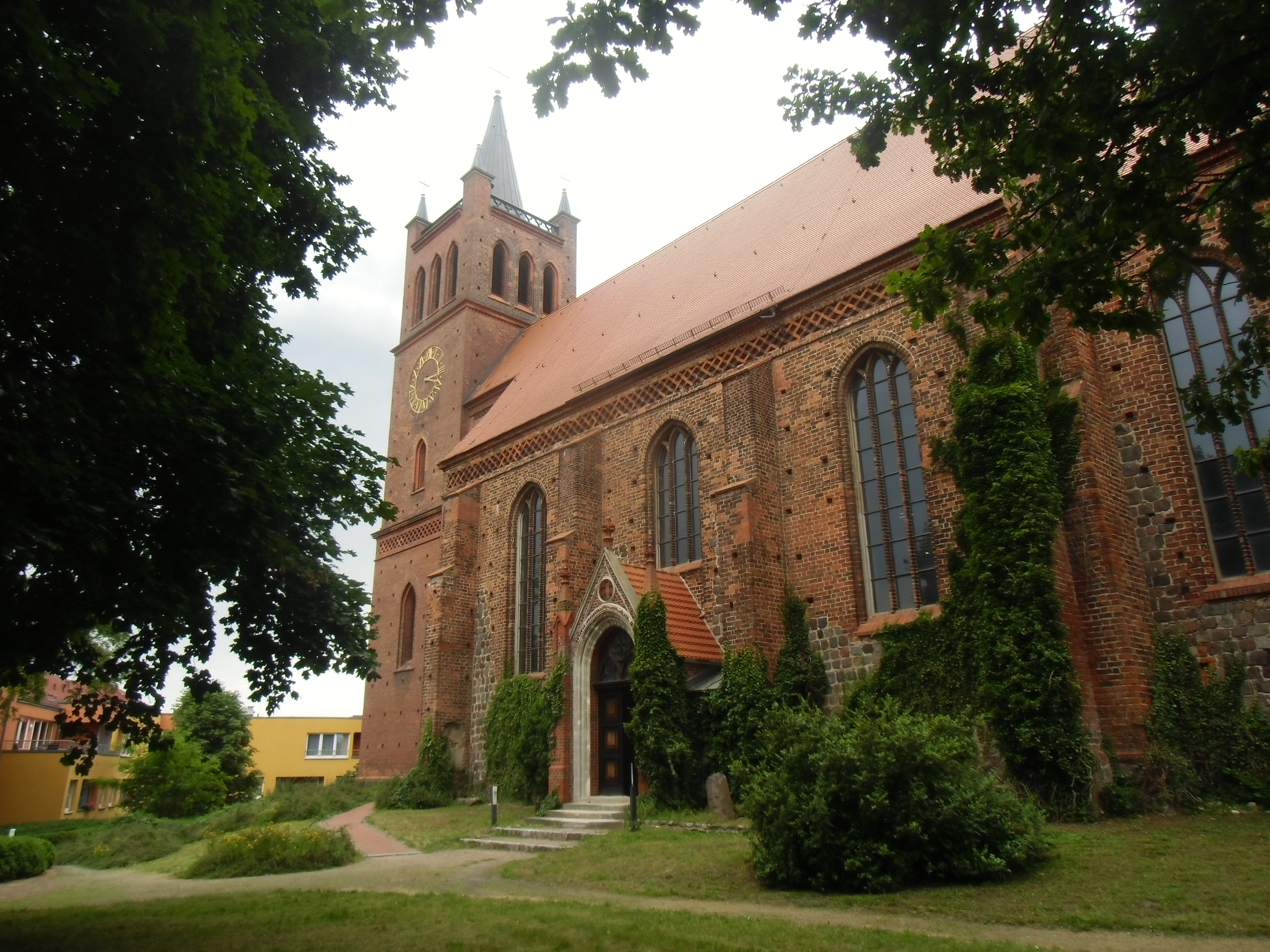 Ursprung als einschiffige Kirche erste Hälfte des 13. Jahrhunderts, im 15. Jahrhundert zu einer zweischiffigen Kirche umgebaut, Abriss des alten Turms 1827, neuer Turm nach Plänen von Karl Friedrich Schinkel, 1945 zerstört. Wiederaufbau 1992-1998. Eingetragen in der Liste der Baudenkmale in Müncheberg